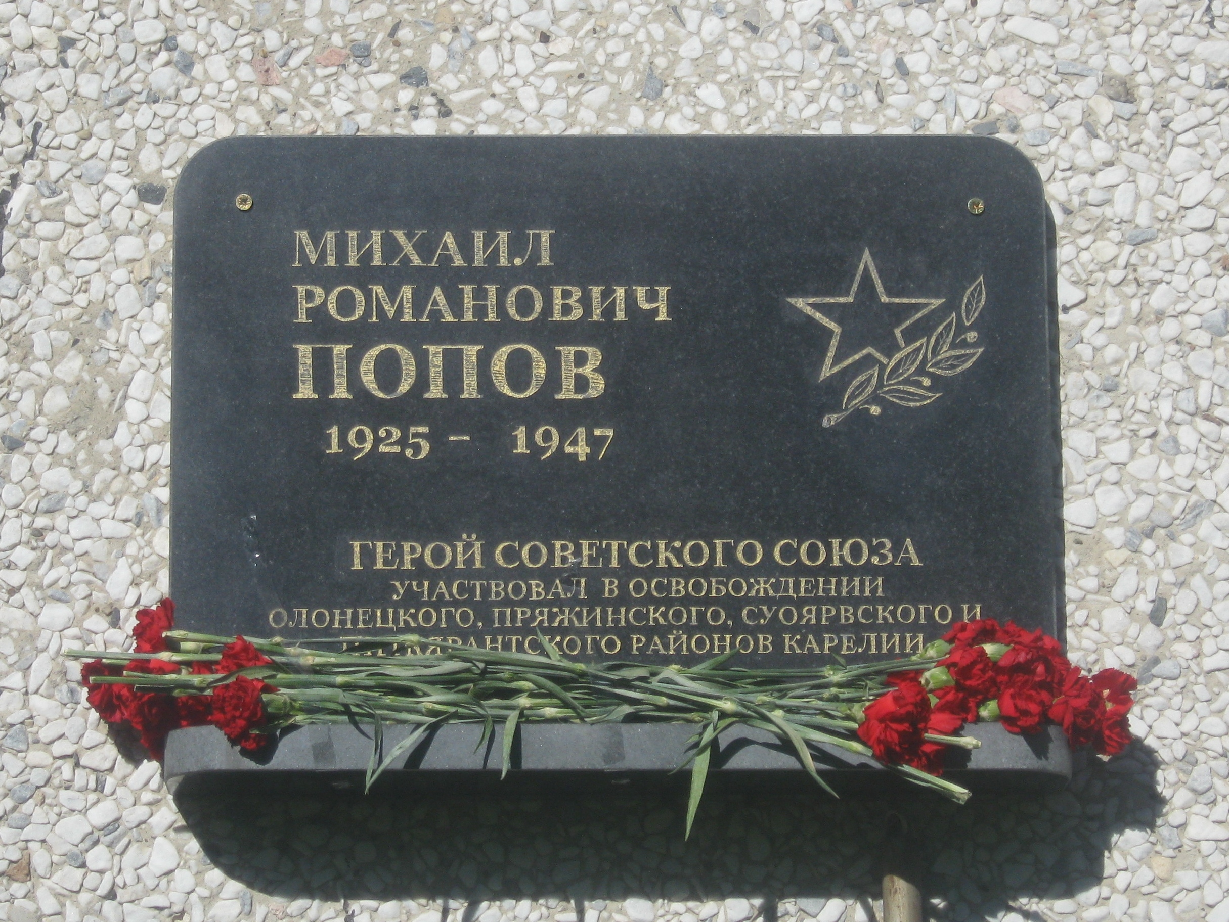 Мемориальная доска Михаилу Попову в Петрозаводске